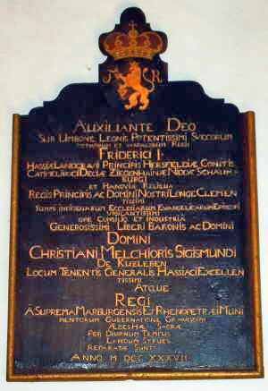 Ansicht der Tafel zur Erinnerung an die Renovierung 1737/38 in lateinischer Sprache